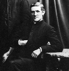 Allan MacDonald (poet)